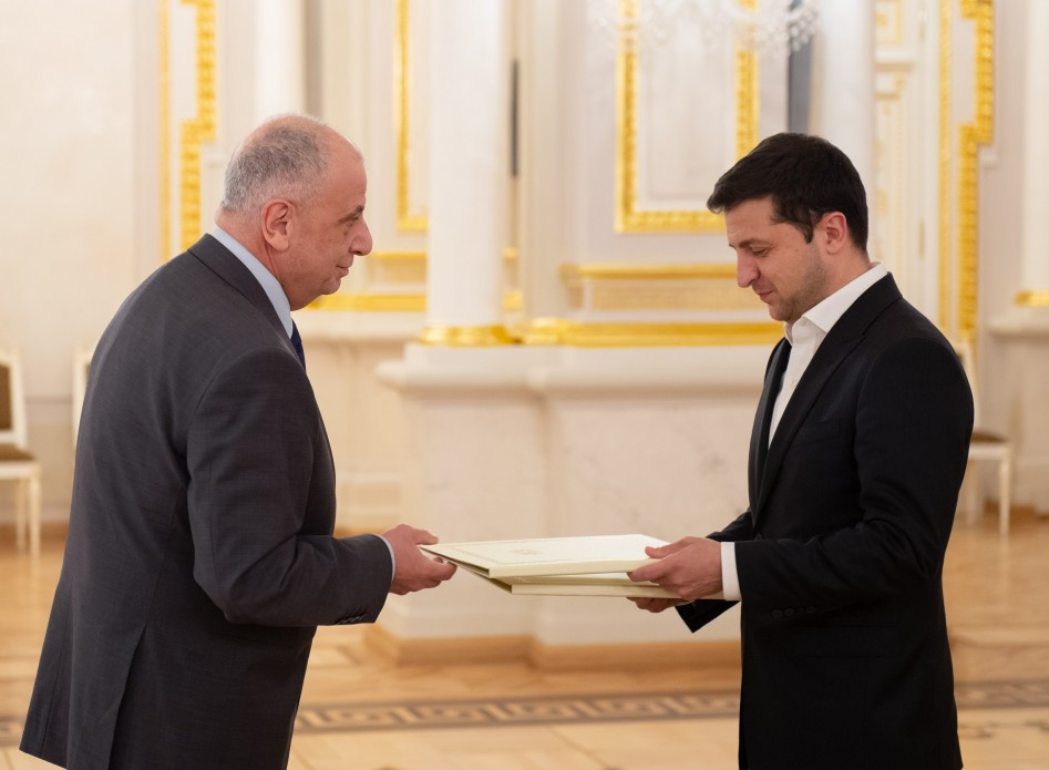 Президент України Володимир Зеленський прийняв вірчі грамоти у послів низки іноземних держав: Грузії - Теймураз Шарашенідзе